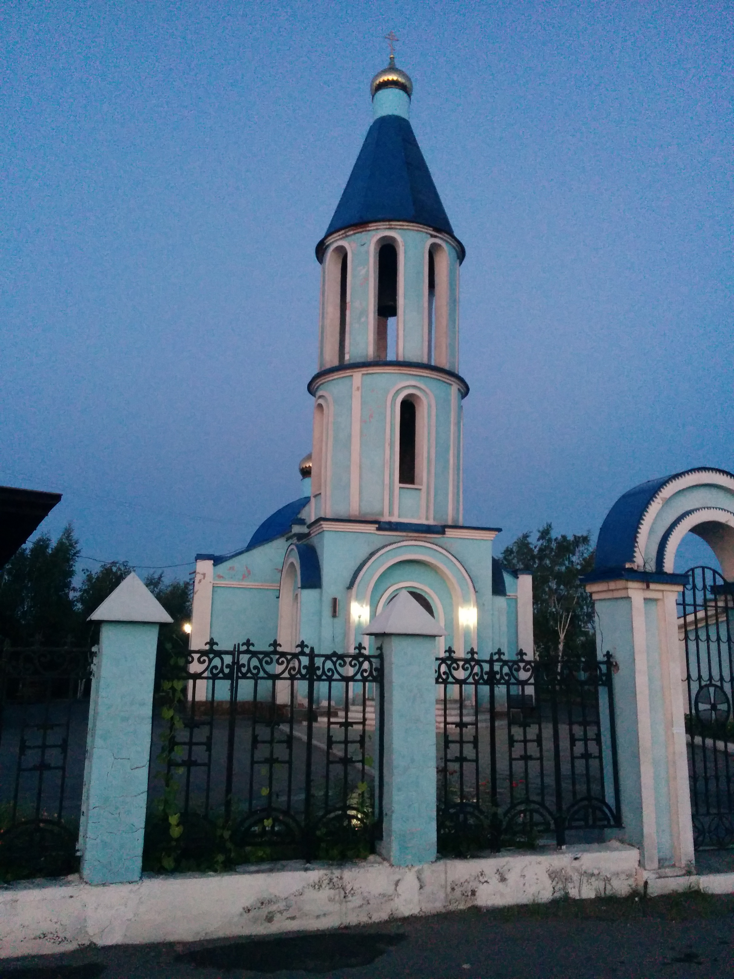 Тыва дыл: Кызылда "Свято-Троицкий храм" хүрээзи.Тыва дыл: Свято-Троицкий храм в г.Кызыле.